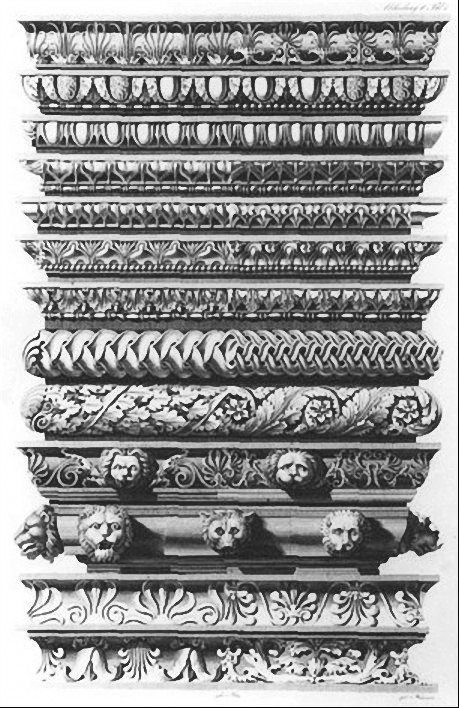 Illustration from "Vorbilder für Fabrikanten und Handwerker" (Patterns for manufacturers and handicraftsmen), edited by Christian Peter Wilhelm Beuth and Karl Friedrich Schinkel.